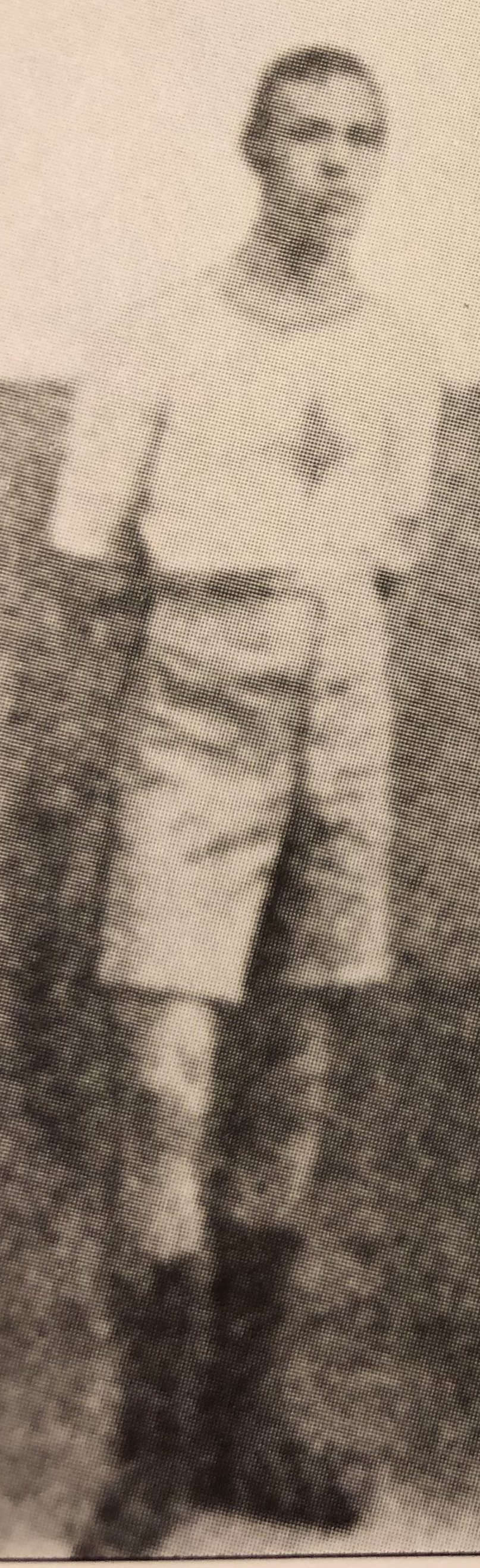 Högst troligt är detta Carl Hammarlund som vann SM-guld 1905 på 400 meter. Det enda på herrsidan i IFK Kristianstads historia.